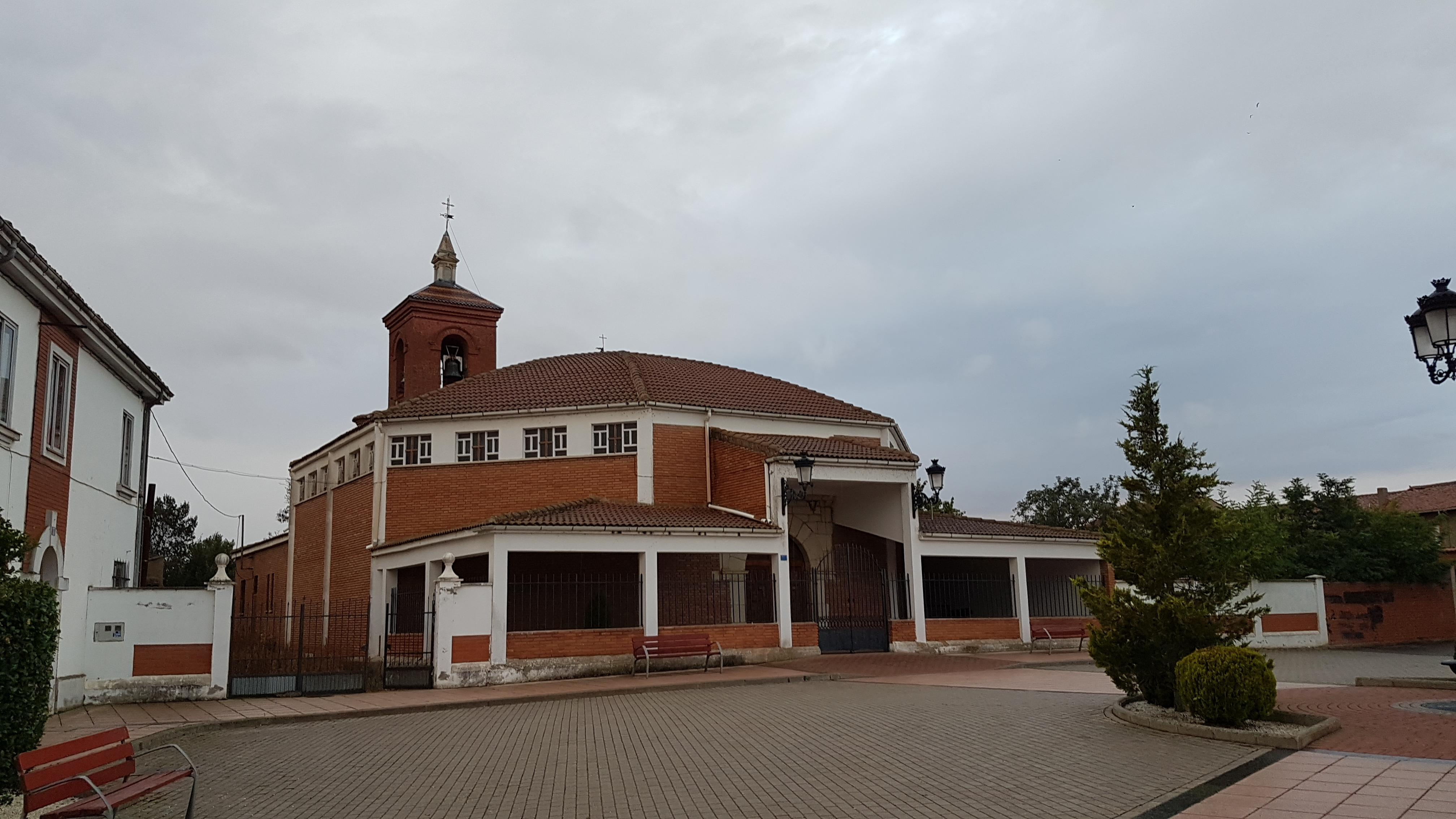 Iglesia de Nuestra Señora de las Nieves de Vega de Infanzones